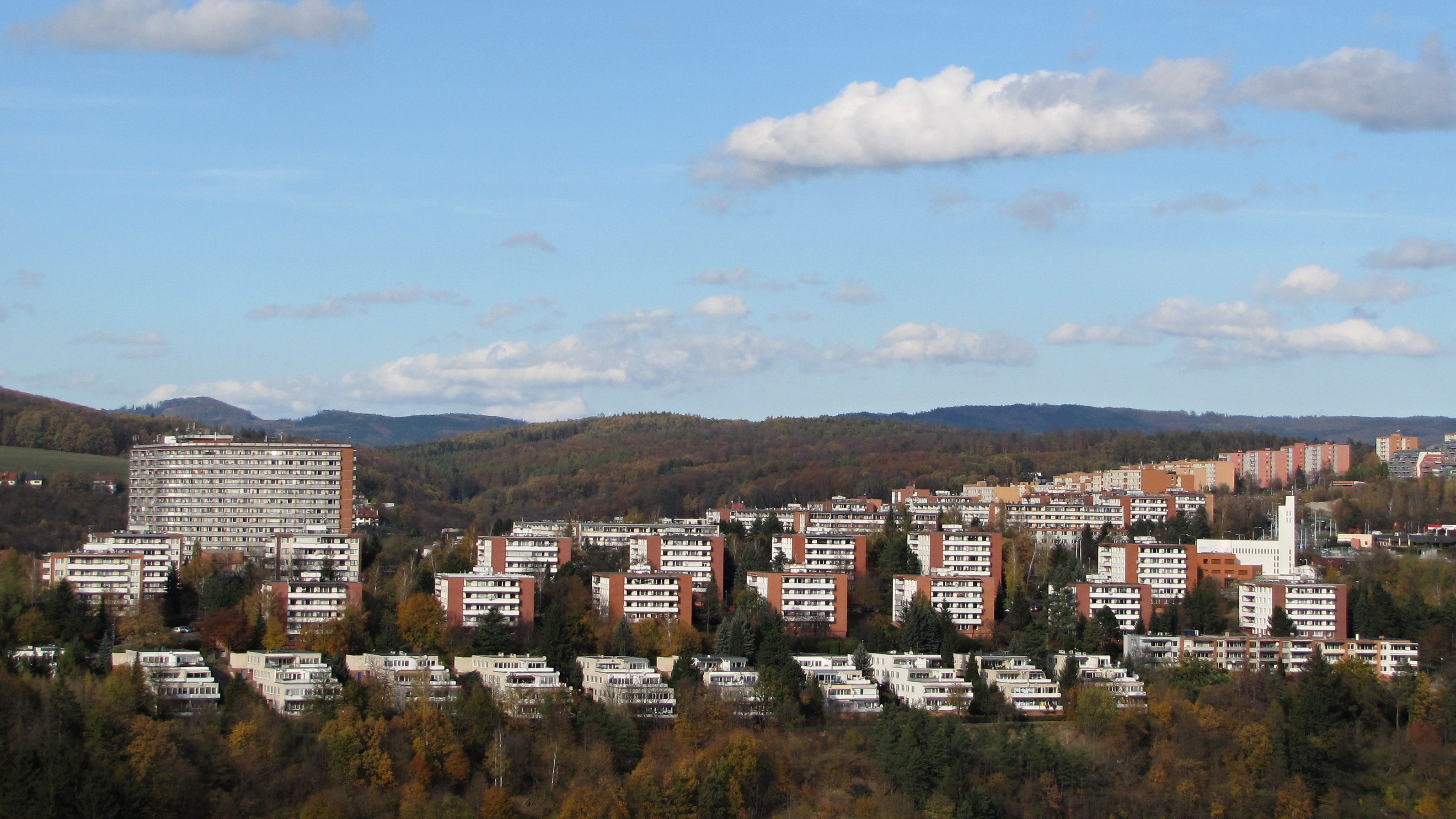 Pohled z Baťova markodrapu na zástavbu v severní části města